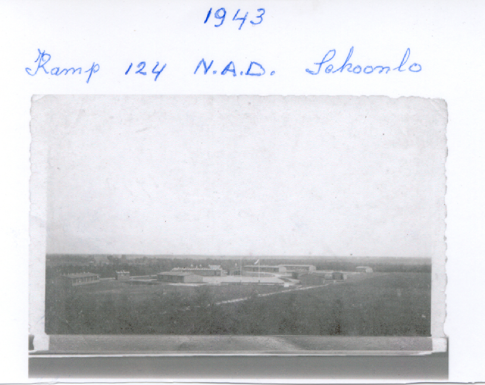 Overzicht Kamp Groot